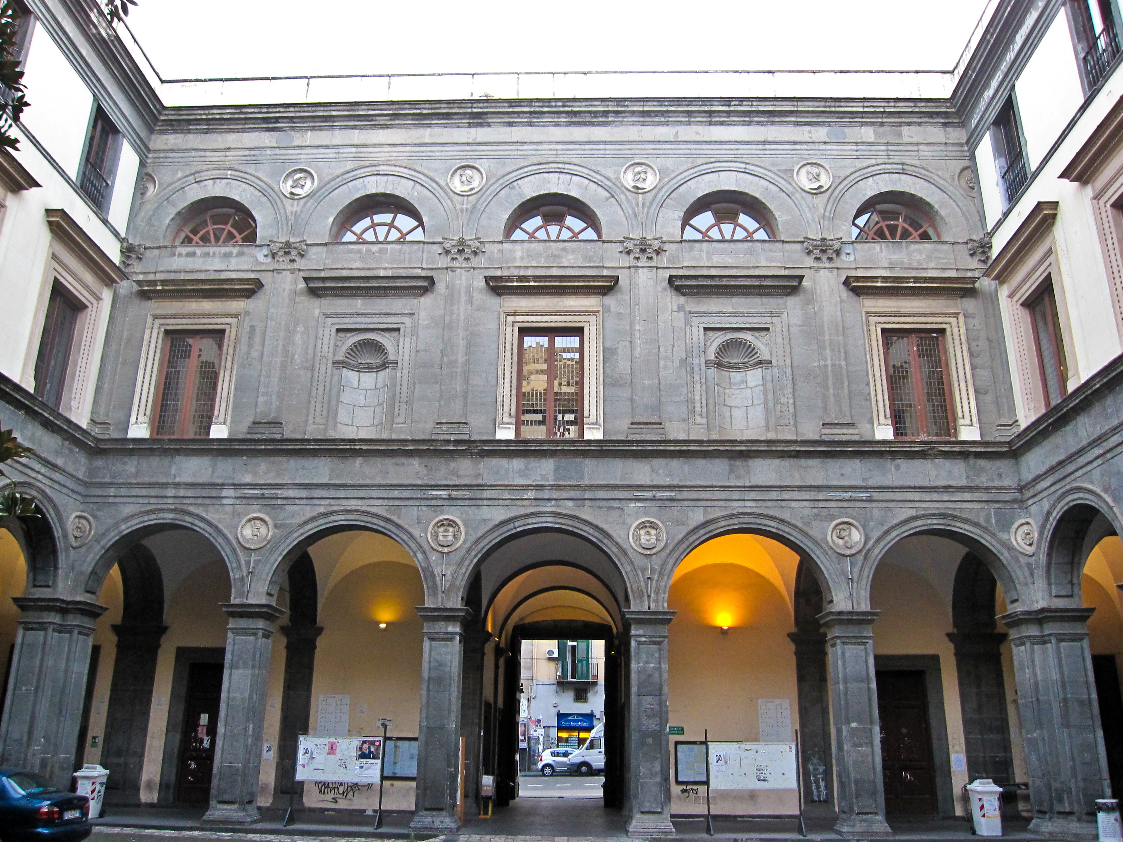 Cortile interno del Palazzo Orsini Gravina (Napoli).